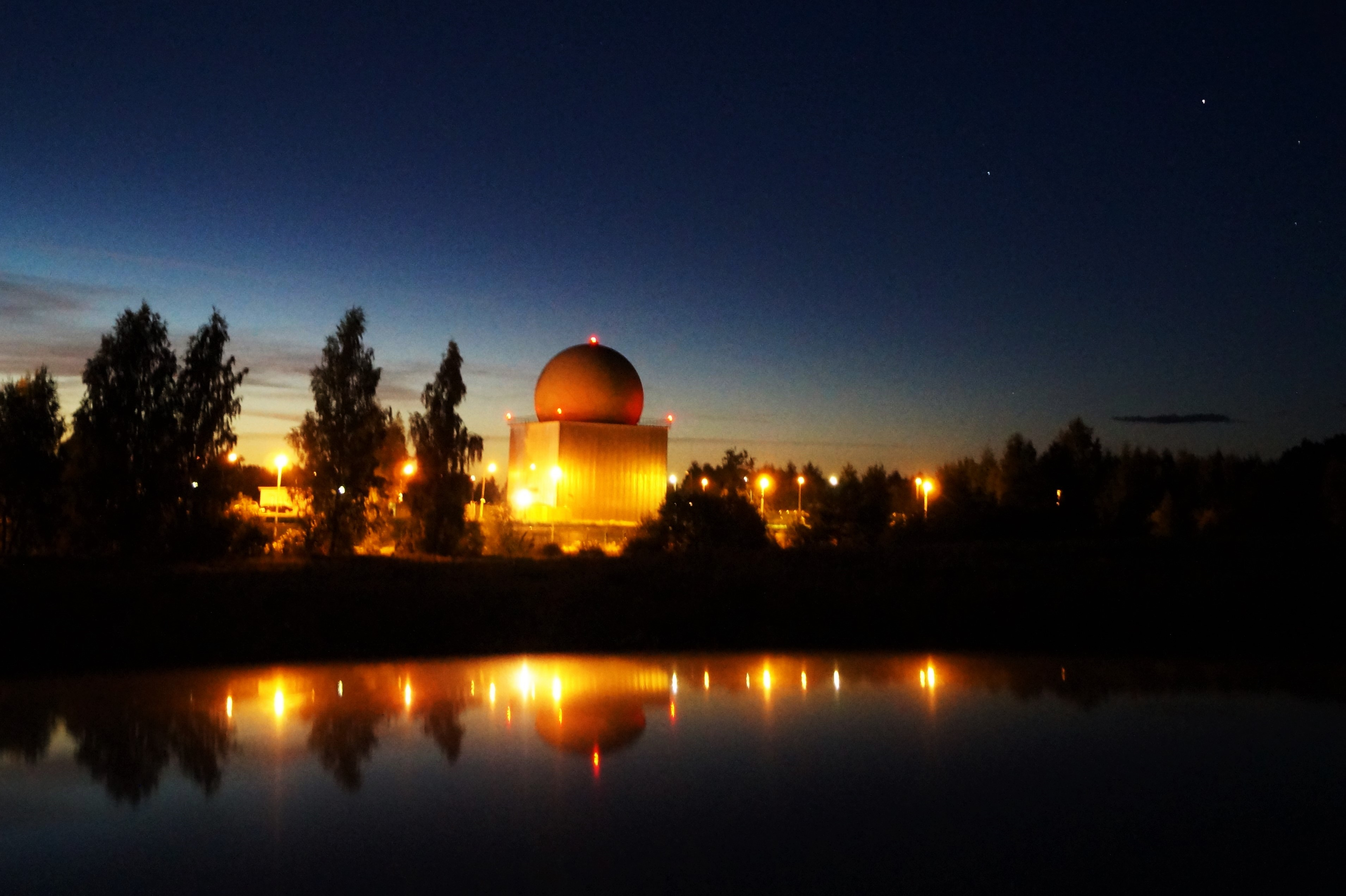 NATO Kūciņu radars "TPS-117"